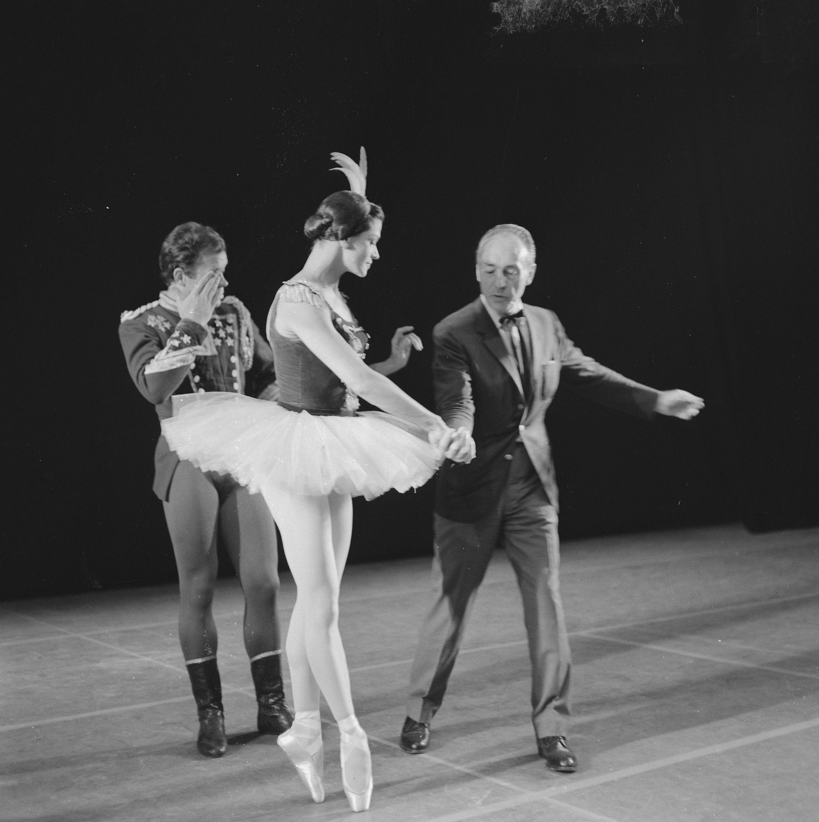 Collectie / Archief : Fotocollectie Anefo Reportage / Serie : [ onbekend ] Beschrijving : New York City Ballet in Amsterdam, repetitie New York City Ballet. Choreograaf George Balanchine geeft aanwijzingen Datum : 26 augustus 1965 Locatie : Amsterdam, Noord-Holland Trefwoorden : ballet, choreografen, repetities Persoonsnaam : Balanchine George Instellingsnaam : New York City Ballet Fotograaf : Kroon, Ron / Anefo Auteursrechthebbende : Nationaal Archief Materiaalsoort : Negatief (zwart/wit) Nummer archiefinventaris : bekijk toegang 2.24.01.03 Bestanddeelnummer : 918-1118